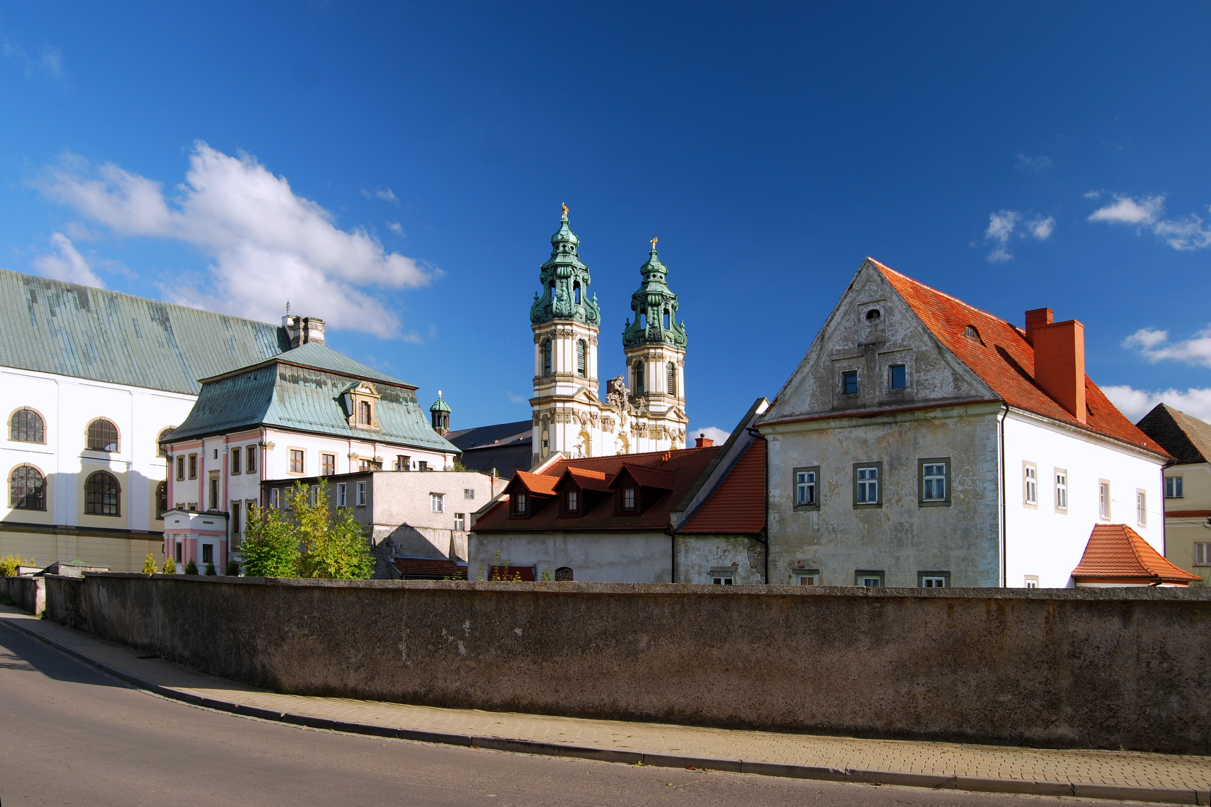 Krzeszów, zespół klasztorny cystersów, ob. benedyktynek, XVIII